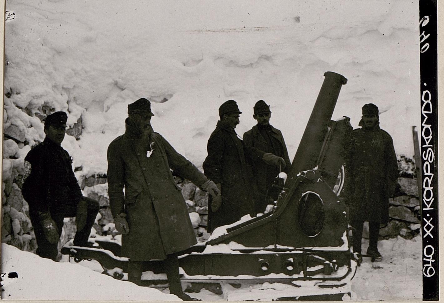 Drei Zinnen-Plateau: Minenwerfer